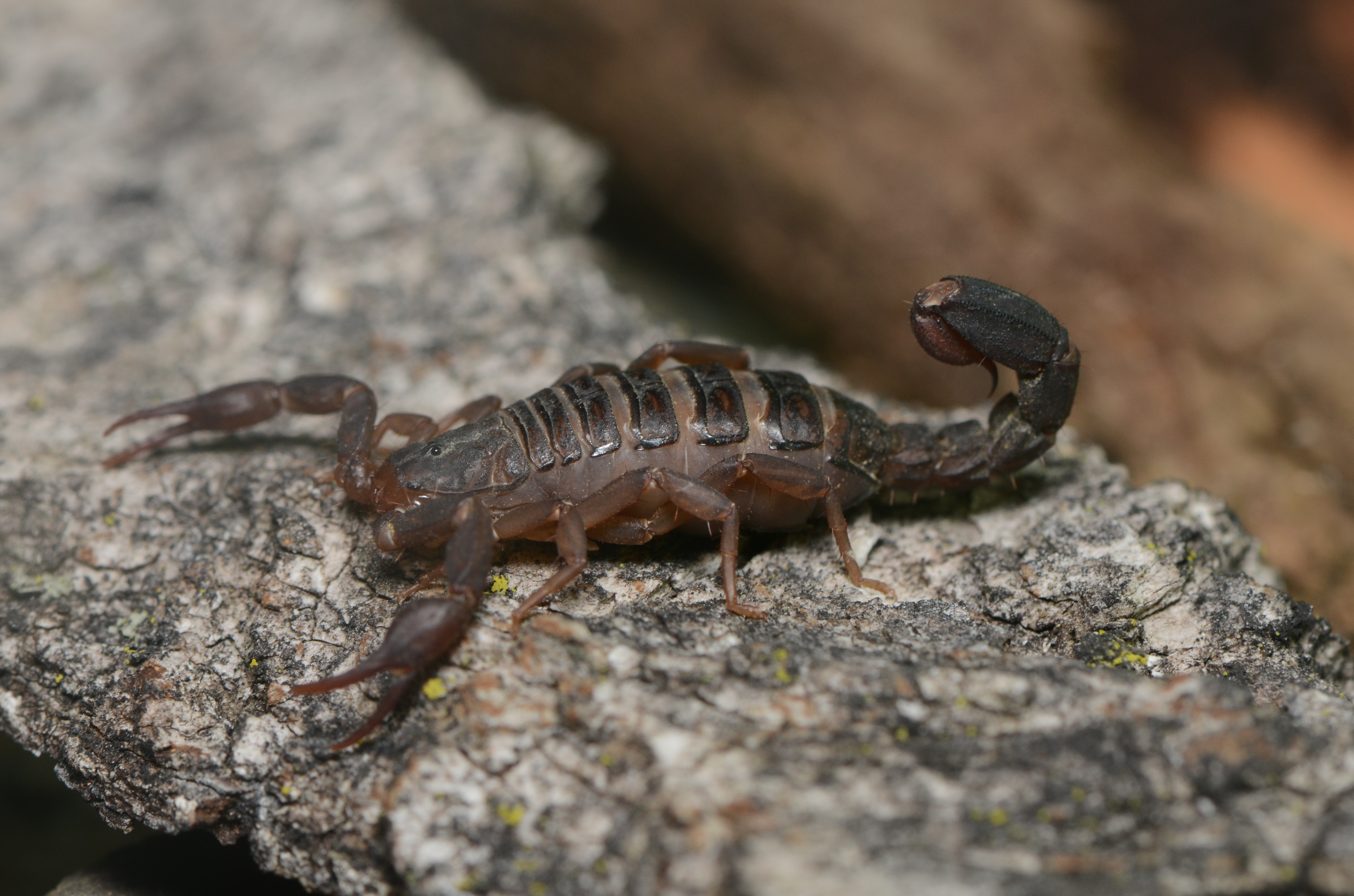 Pregnant scorpion